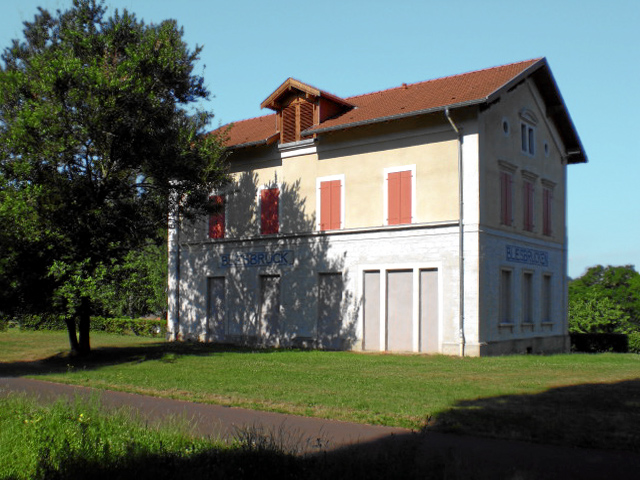 Bliesbruck/Bliesbrücken-Gare avec bi-lingual nom de station